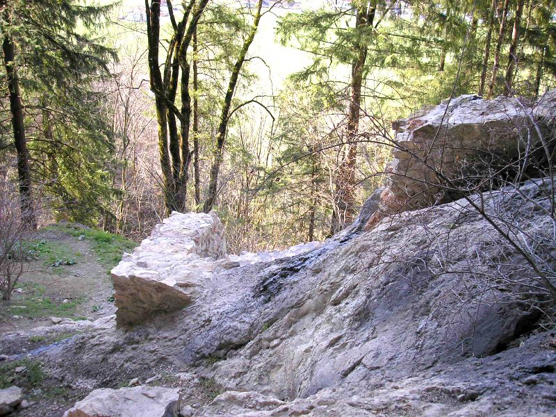 Höhlenburg Loch über Unterpinswang (Tirol). Die sanierten Mauerreste.